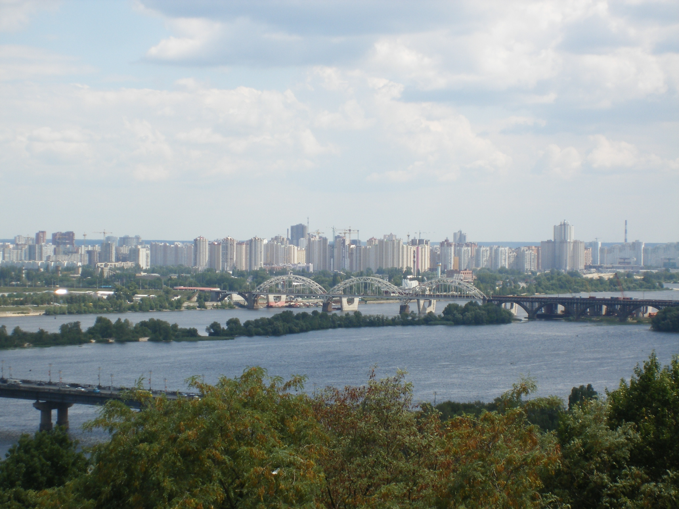 1949 г.